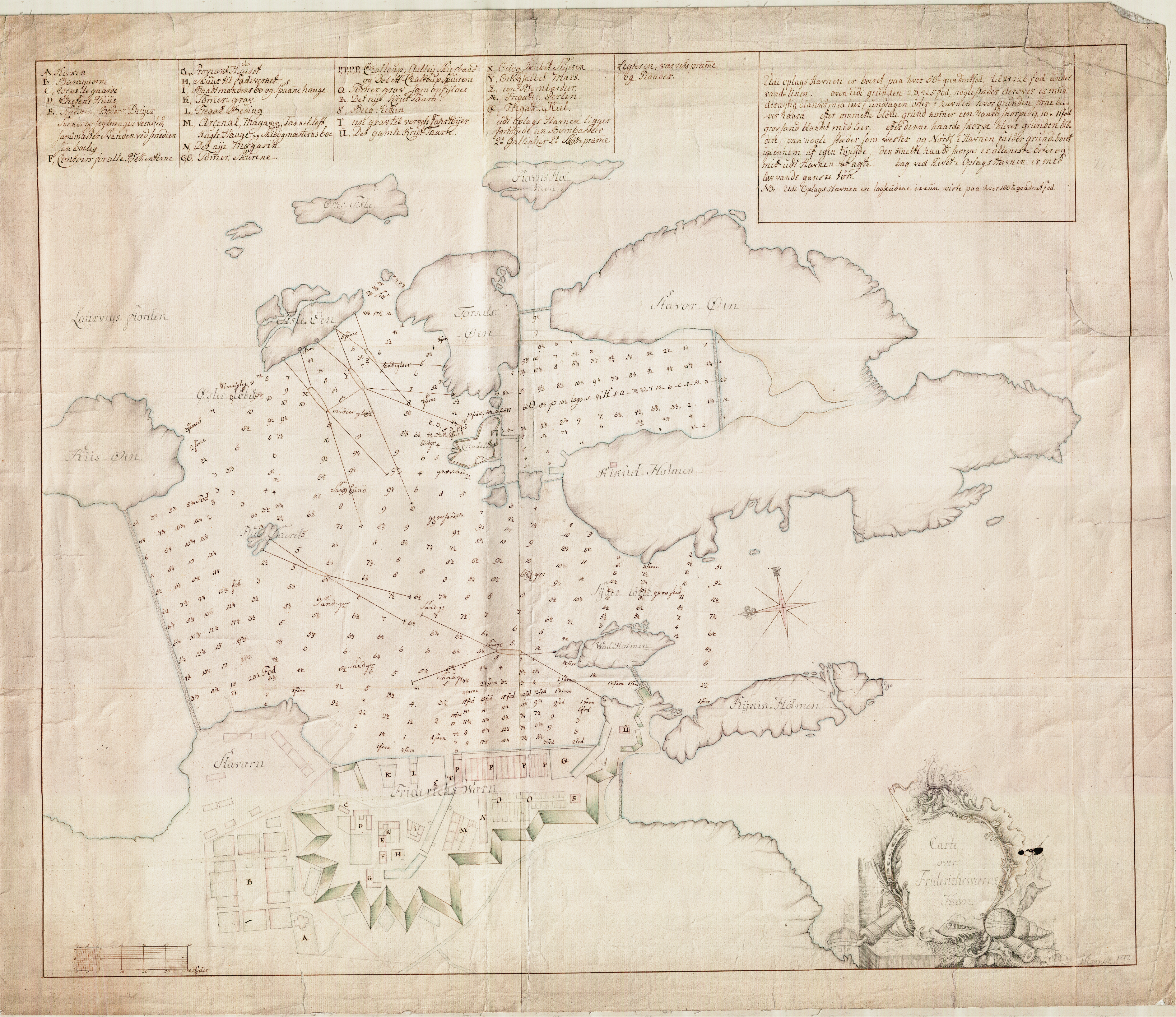 Sjøkart over havnen ved Fredriksvern fra 1777. Håndtegnet i omtrentlig målestokk 1:2000. Original kartstørrelse ca 78 x 66 cm. Et eksemplar befinner seg hos Statens kartverk Sjø i Stavanger.